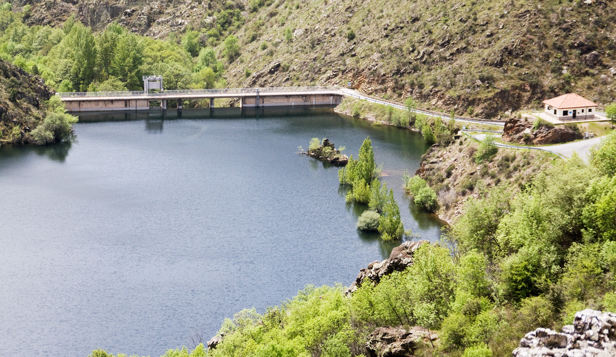 Vista del azud del Pozo de los Ramos en el río Sorbe.